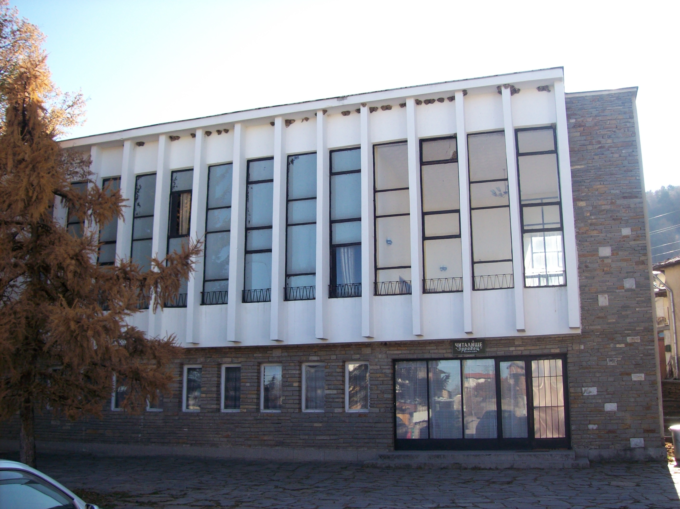 Читалището на Бойково